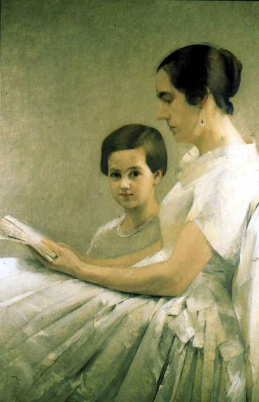 Julio Fossa Calderón Madre e hija